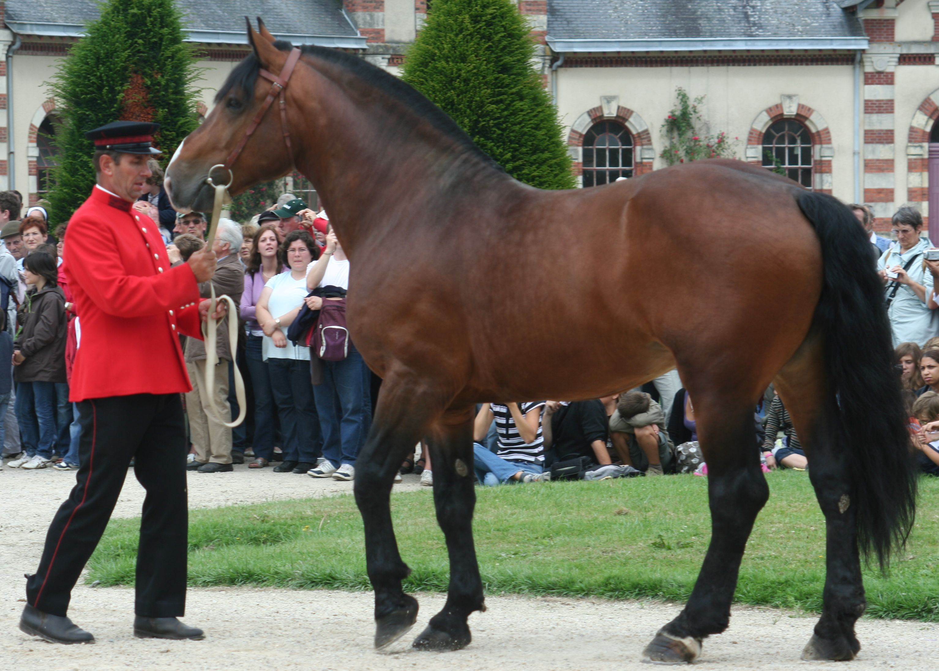 Présentation d'un étalon Cob Normand au haras de St-Lô, France